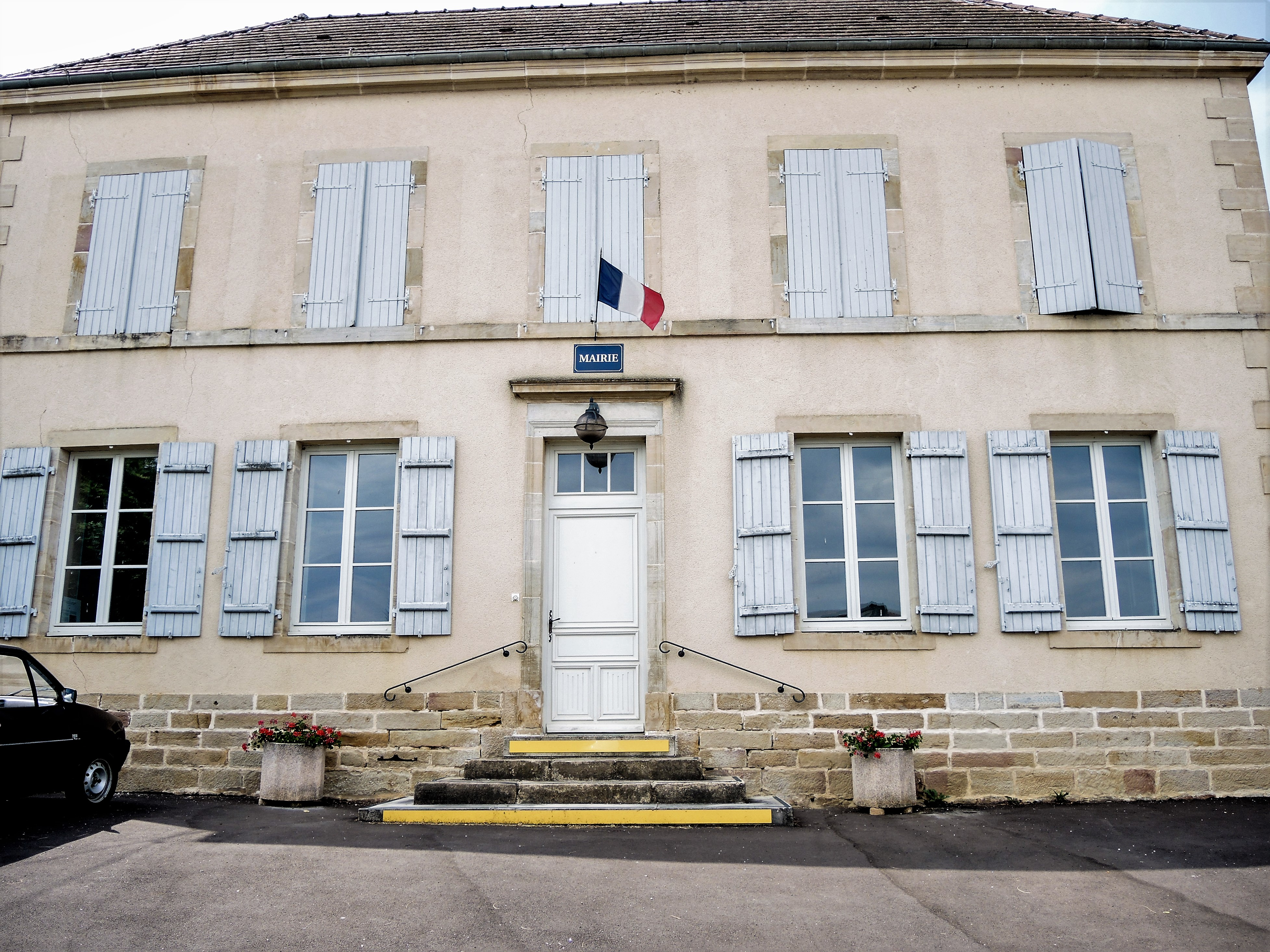 Façade de la mairie